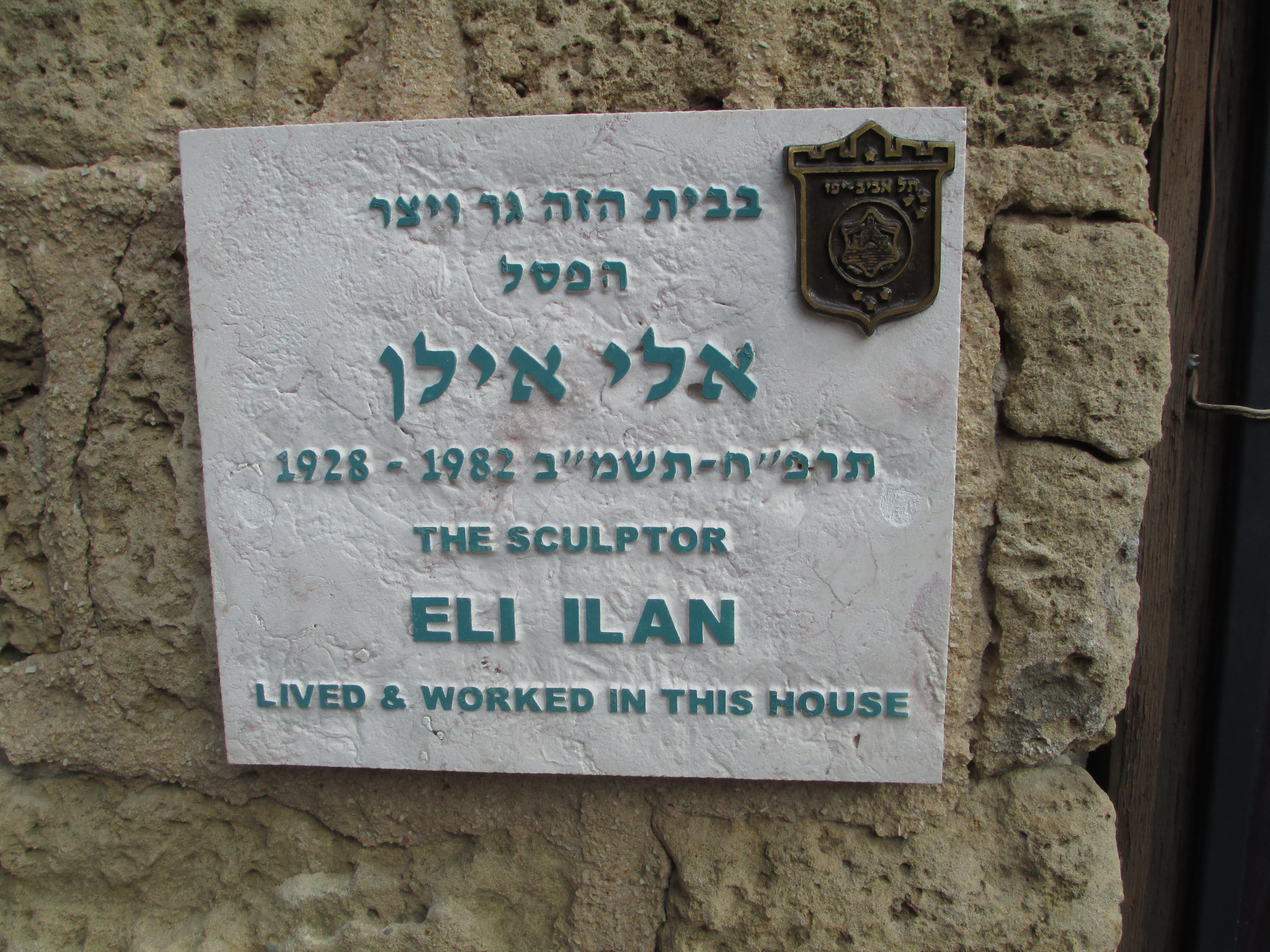 לוחית זיכרון על ביתו של הפסל אלי אילן ברח' שמעון הבורסקי 4 ביפו העתיקה